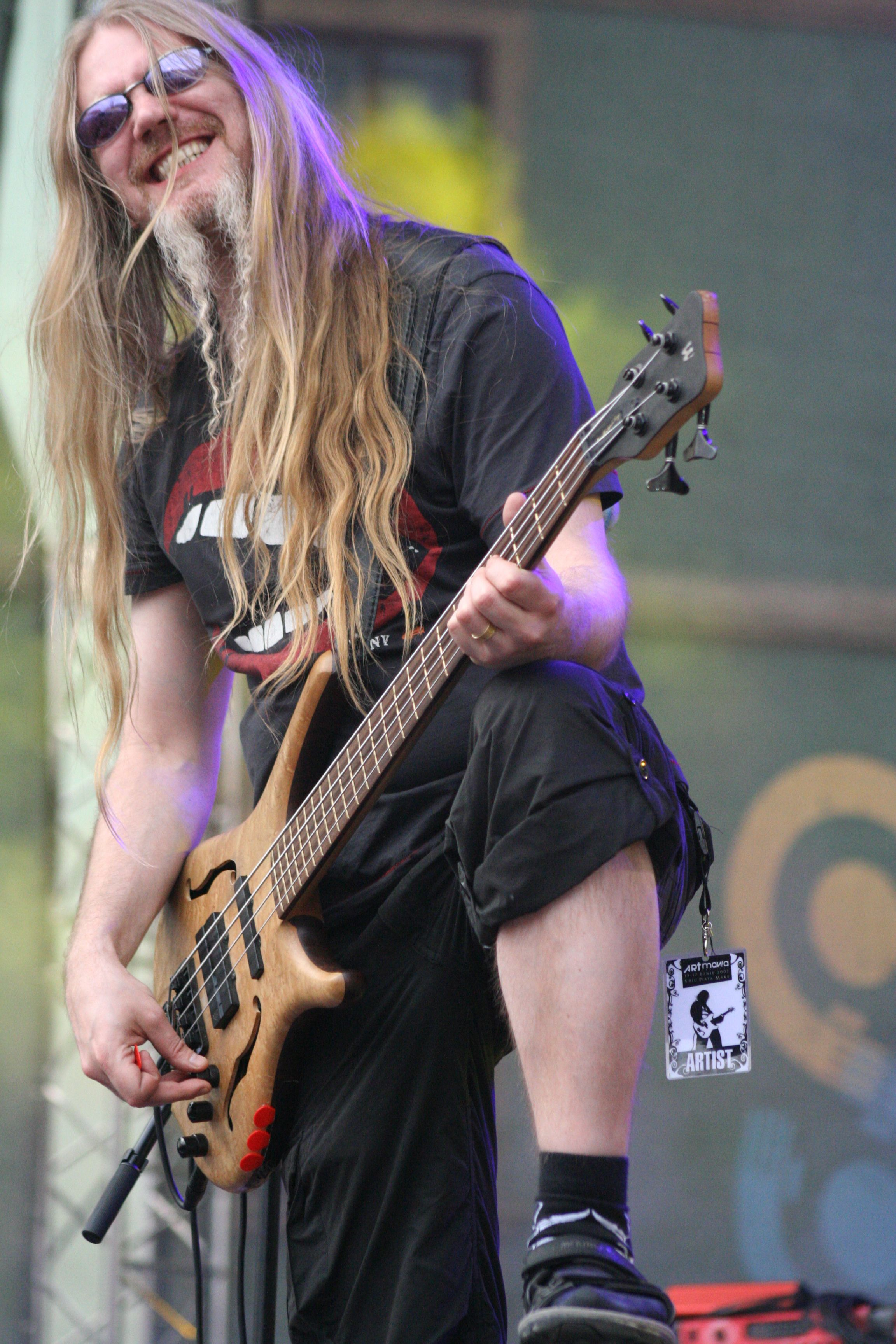 Marco Hietala gitározás közben